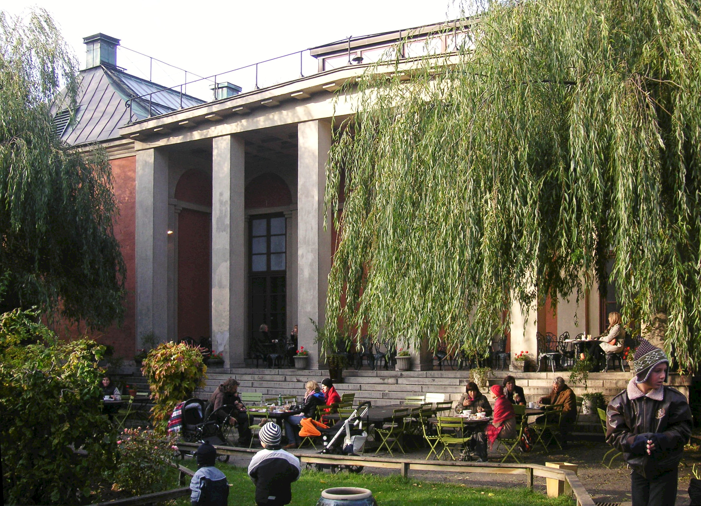 Liljevalchs konsthall i Stockholm, innergården